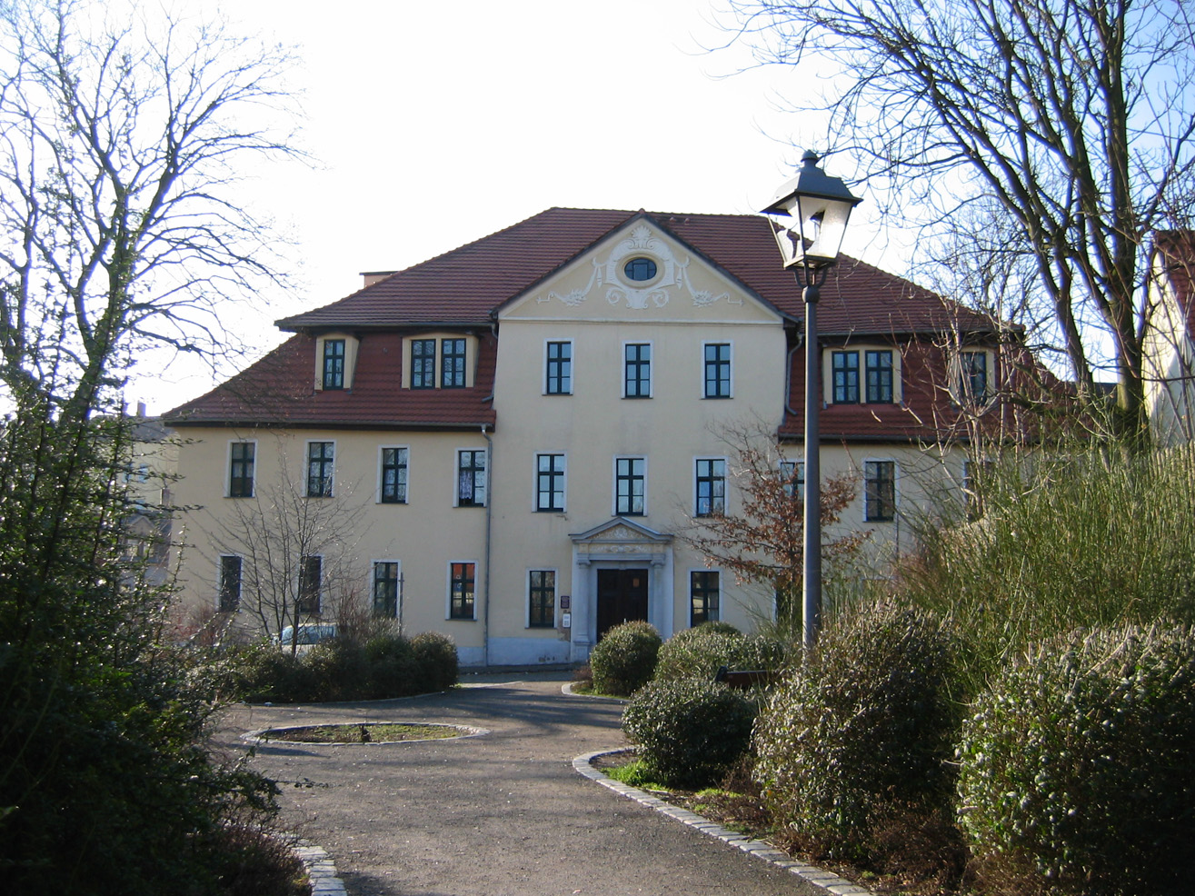 Lutherstadt Eisleben: Haus des Verwalters des Katharinenstiftgutes